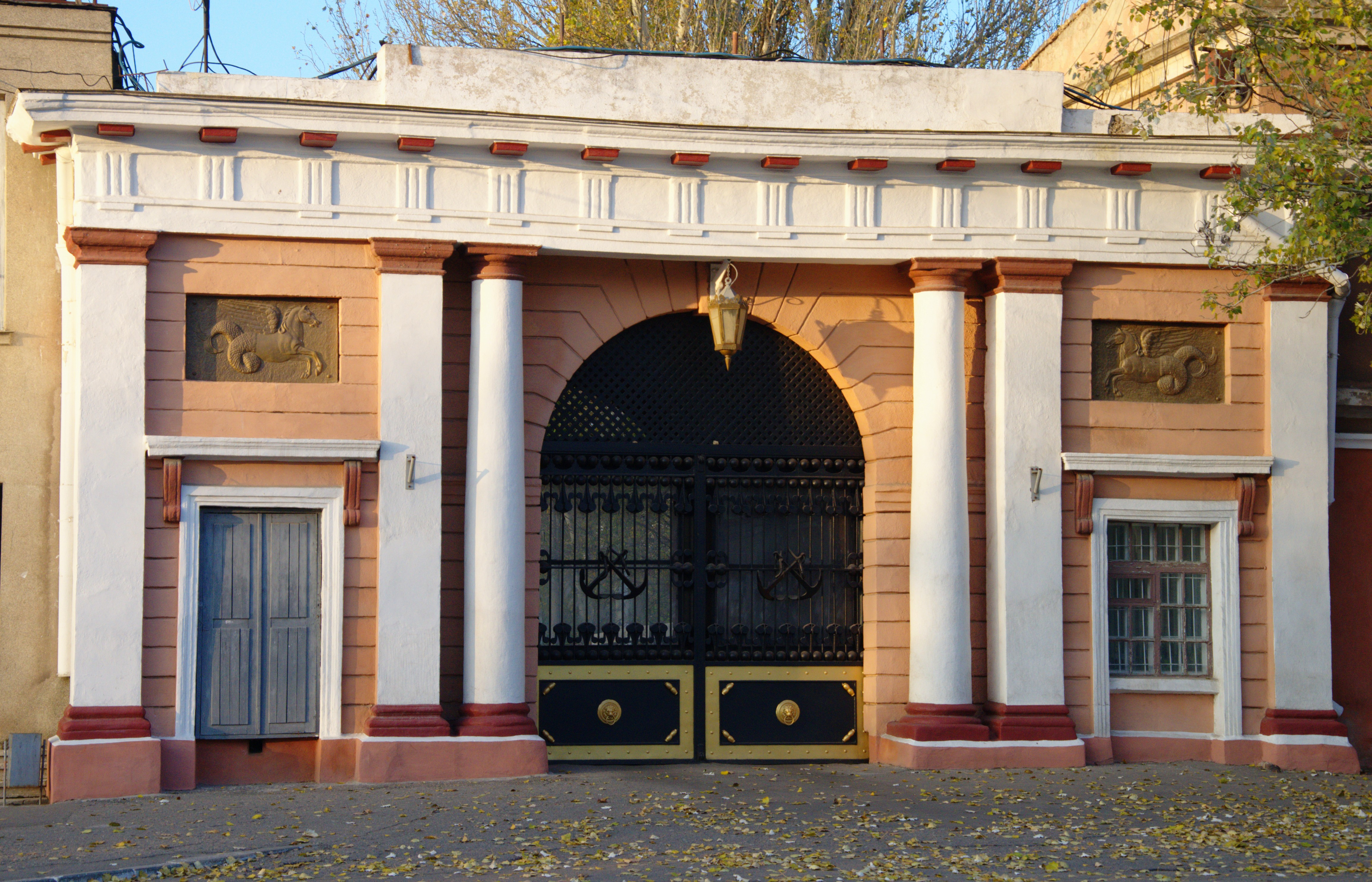 61plant1.jpg: Головні ворота заводу 61-го комунара